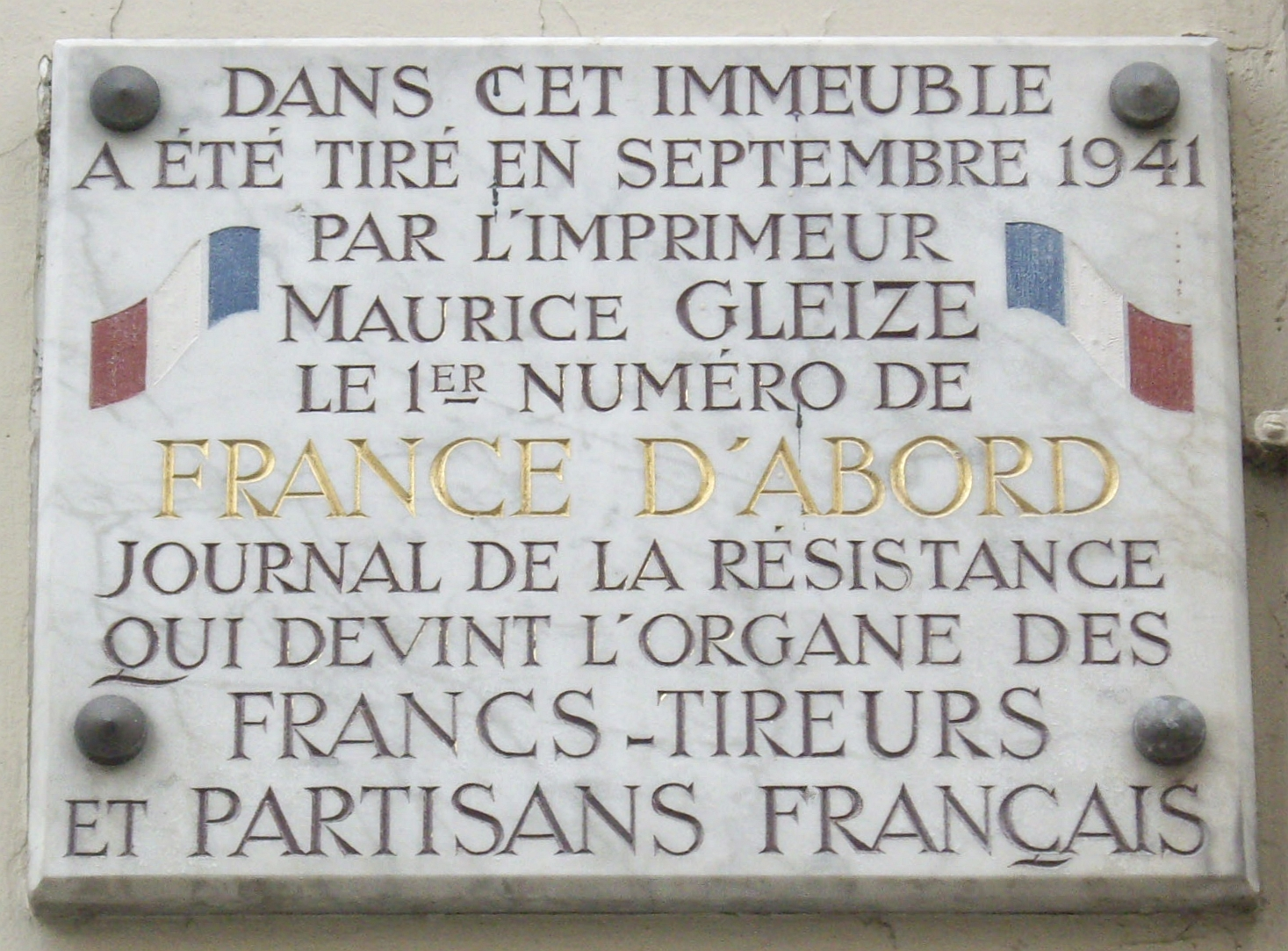 Plaque commémorative, 17 rue des Cloÿs, Paris 18e. « Dans cet immeuble a été tiré en septembre 1941 par l'imprimeur Maurice Gleize le 1er numéro de France d'abord, journal de la Résistance qui devint l'organe des Francs-tireurs et partisans français. »